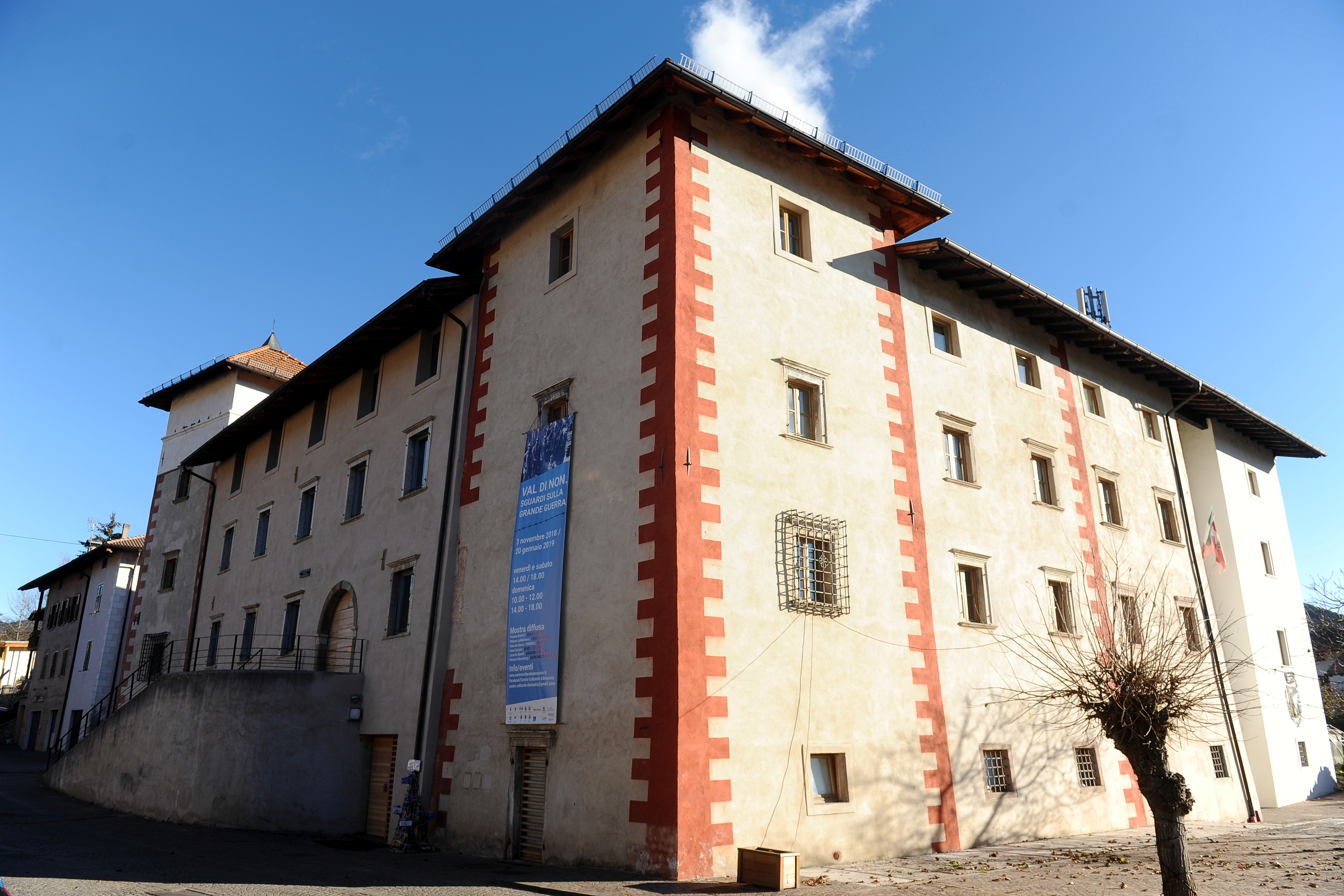 Palazzo Aliprandini Laifenthurn a Livo, Trentino-Alto Adige.